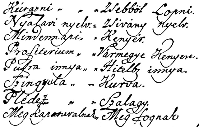 A „Zsivány nyelv” című hajdúböszörményi tolvajnyelvi szójegyzék részlete 1776-ból